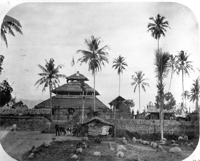 Foto. De Moskee van Indrapoeri in Atjeh